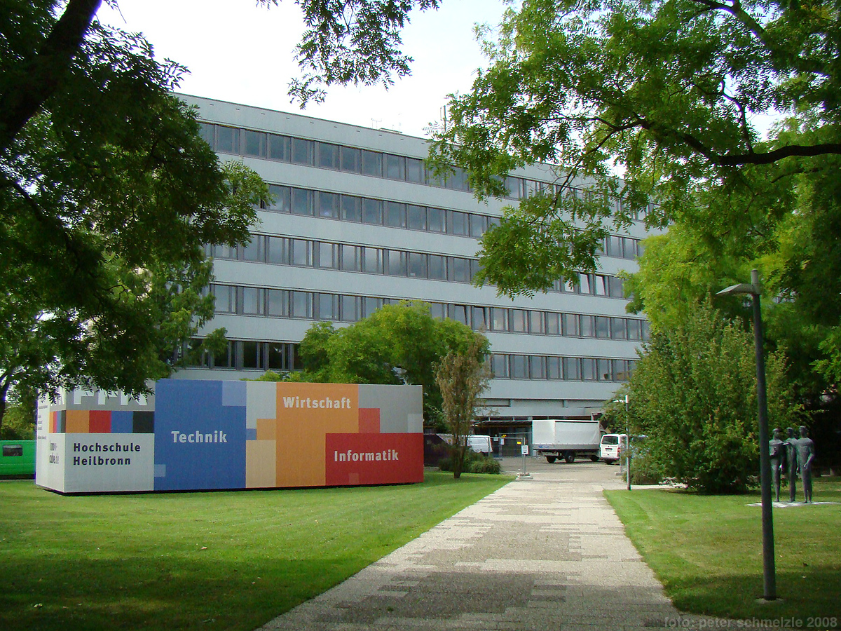 Hochschule Heilbronn, Hauptgebäude